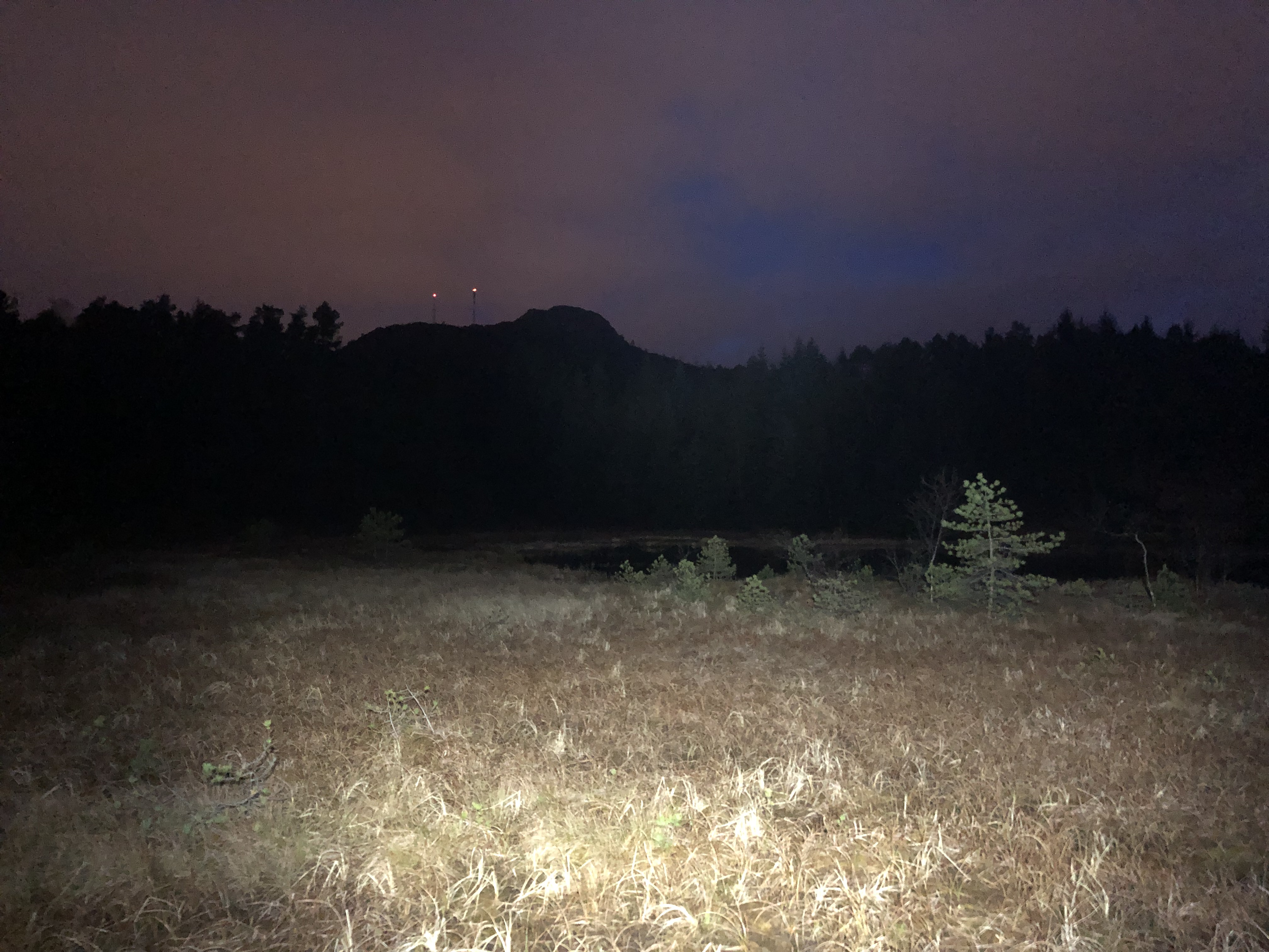 Natt på Langatjørna.